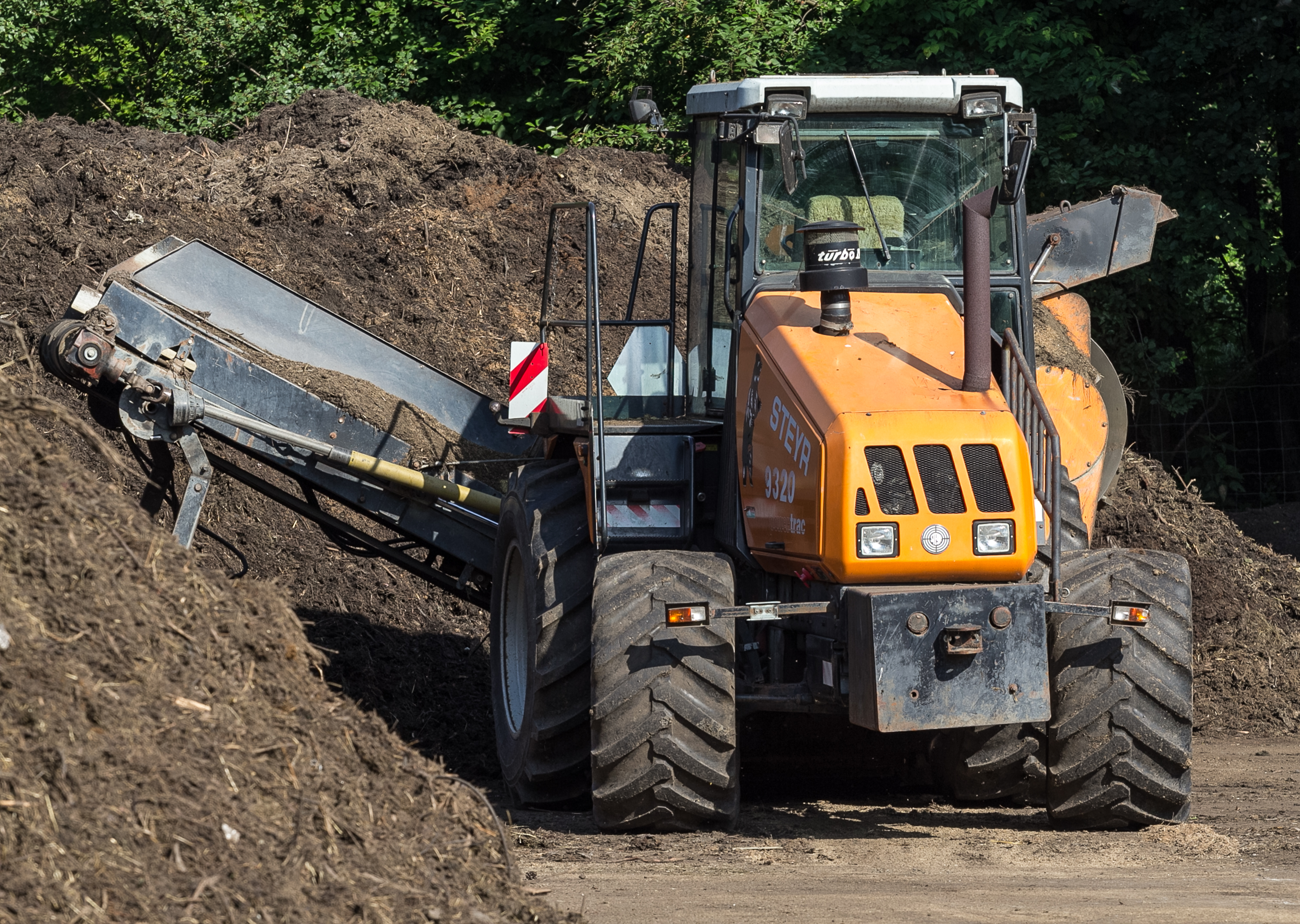 Steyr 9320 Powertrac eingesetzt in der kommunalen Kompostieranlage Weinfelden TG